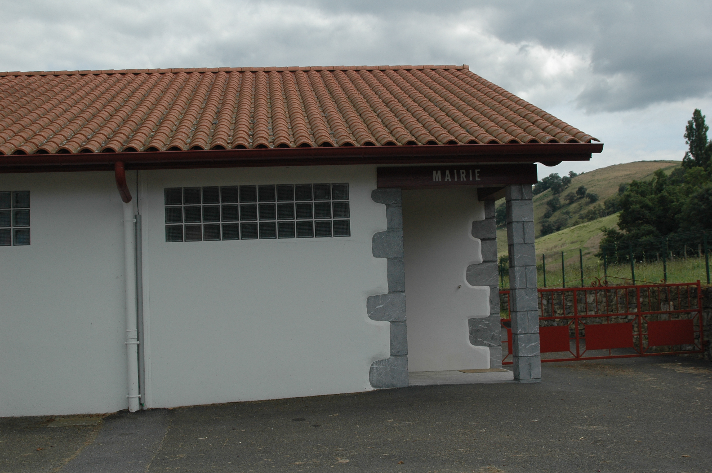 la mairie d'Arhansus